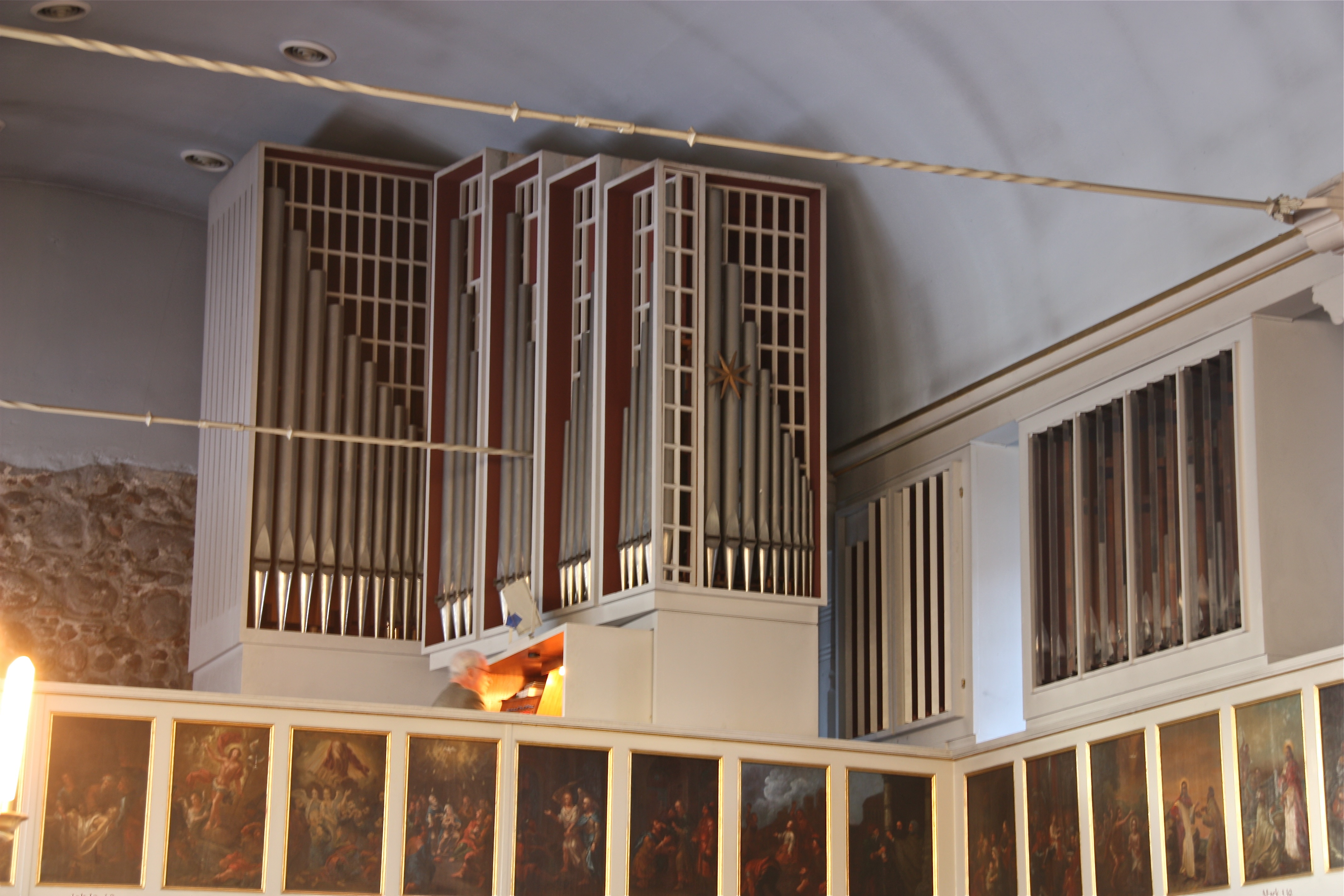 Hamburg, Eppendorf, Kirche St. Johannis, Innenraum, Orgelprospekt